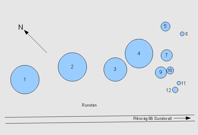 Översikt över Högomfältets gravhögar